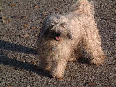 Tibetan Terrier